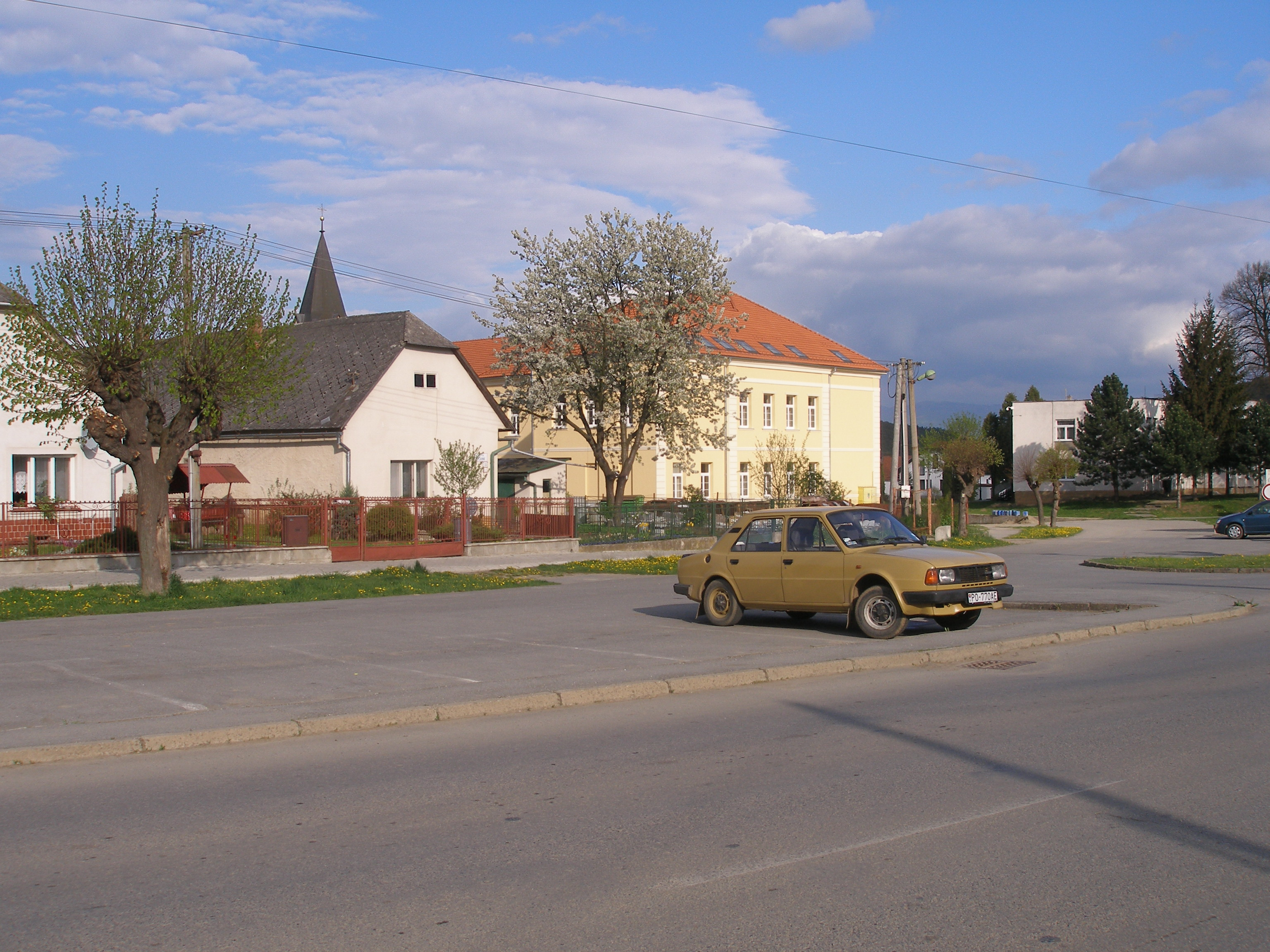 Mesto Veľký Šariš okres Prešov región Šariš